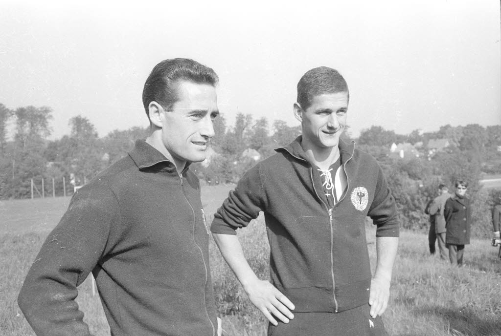 Im Bild Torwart Hans Tilkowski (links) und Max Lorenz.